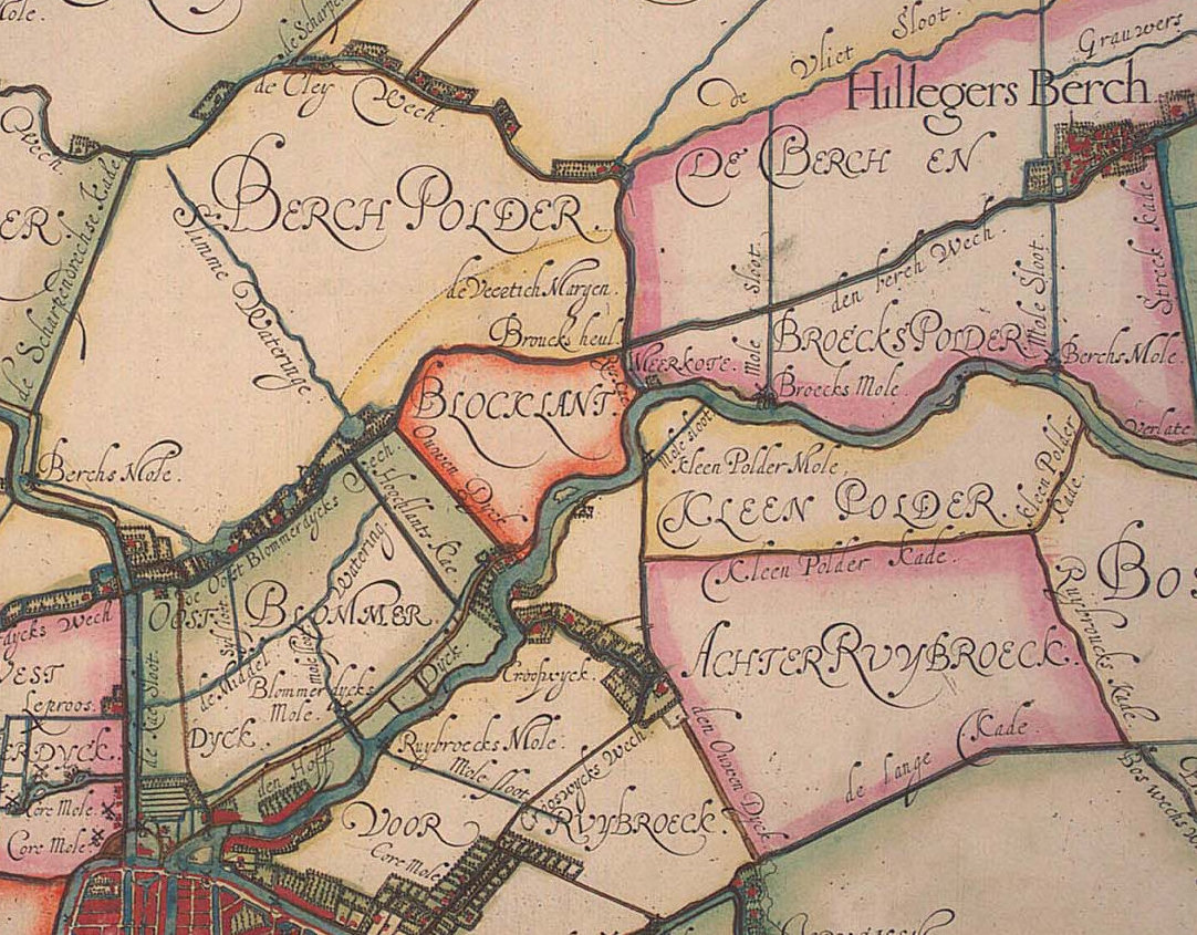 Detail uit de kaart van Schieland van 1611 van Floris Balthasarsz. van Berckenrode